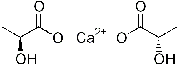 chemical structure of calcium lactate